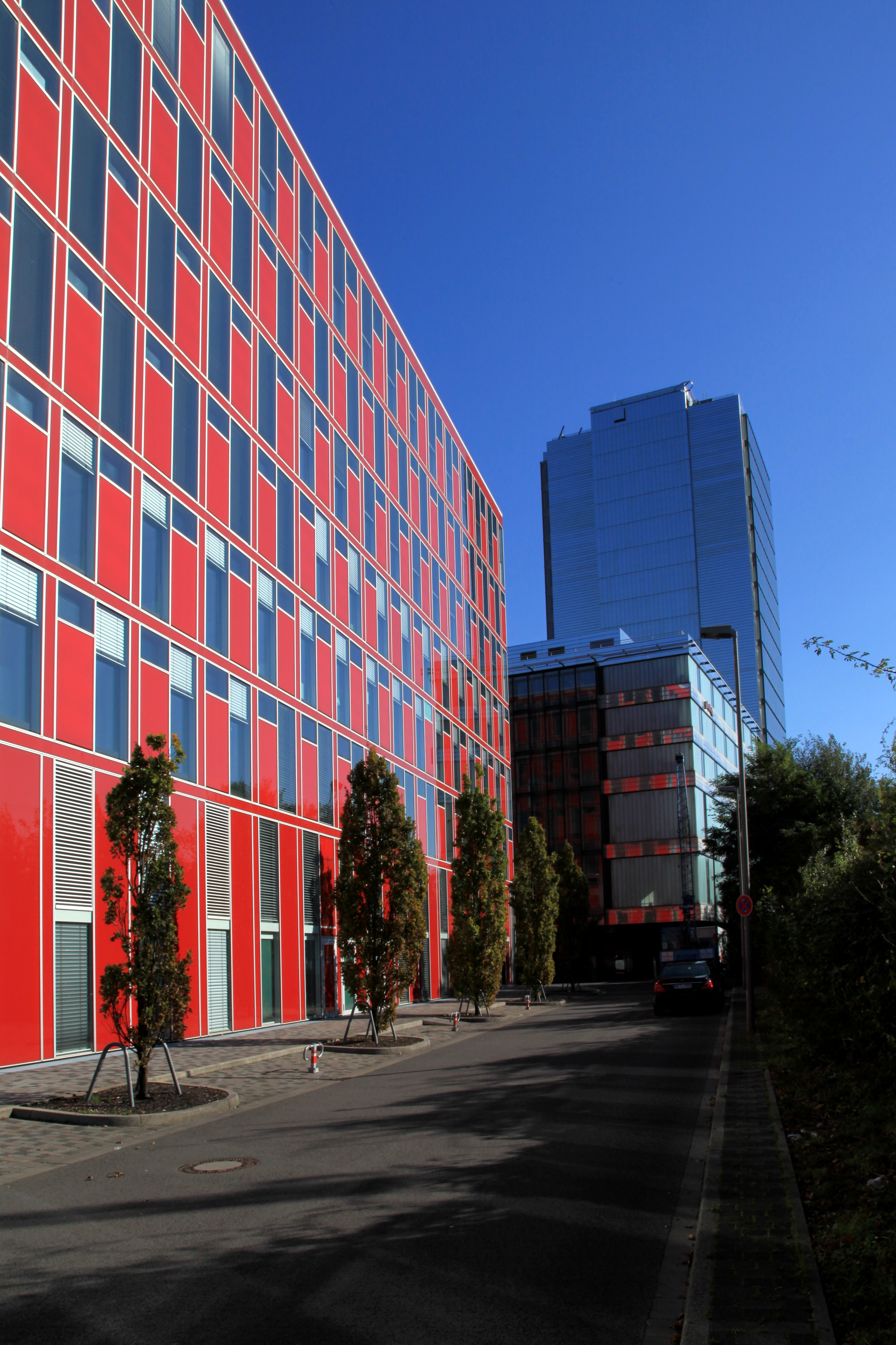 Capricorn-Haus, Killepitschfabrik und Media-Tower an der Holzstraße in Düsseldorf